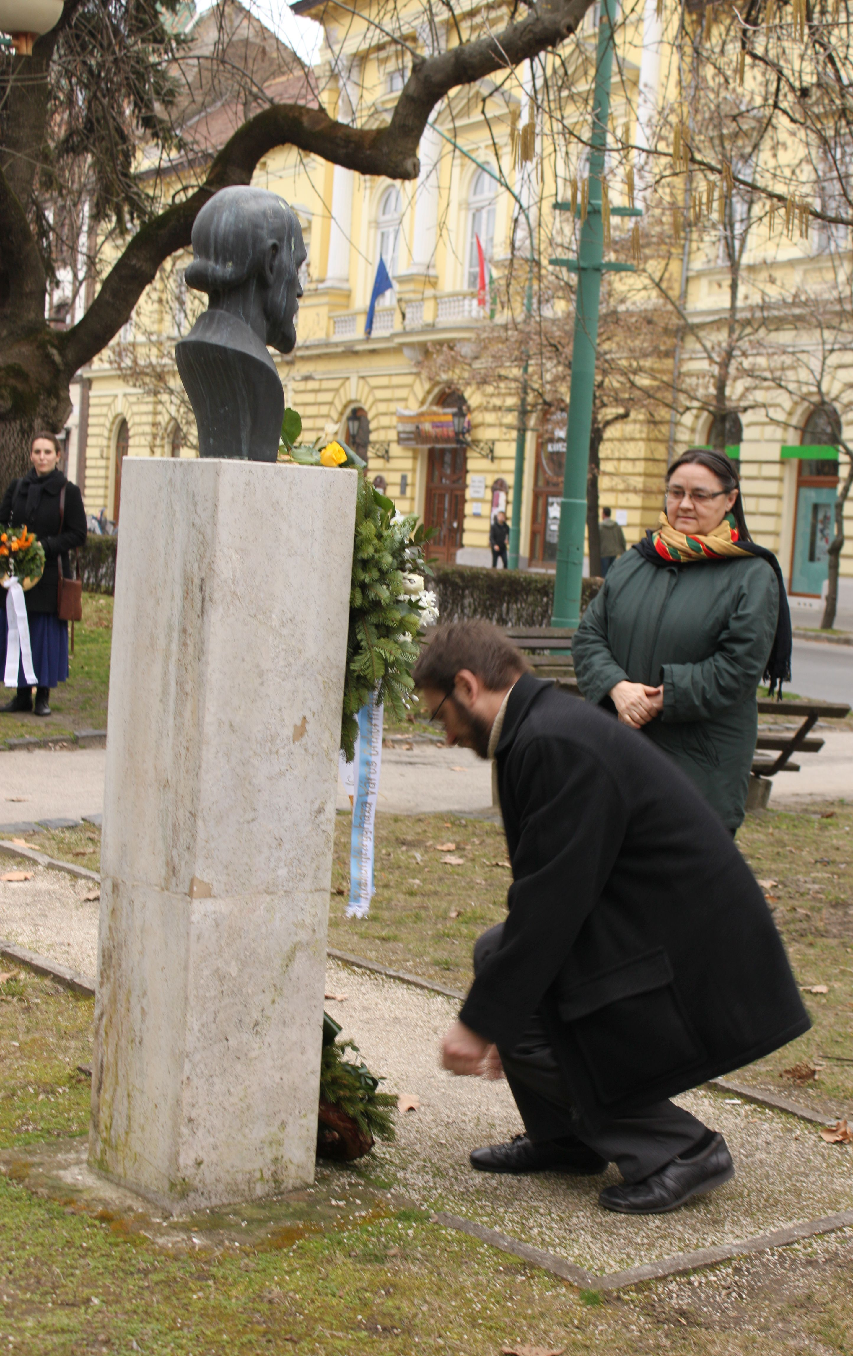 Holló László szobrának koszorúzása Kiskunfélegyházán, születésének évfordulóján